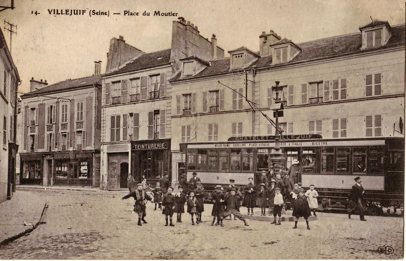 Carte postale ancienne éditée par ELD, n°14 : VILLEJUIF - Place du Moutiers.Vue en gros plan d'une voiture de tramway de la CGPT, ligne Châtelet - Villejuif